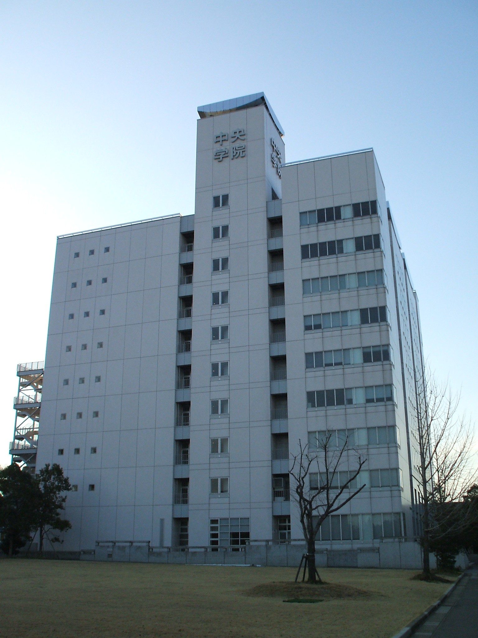 中央学院大学30周年記念館（6号館）東側